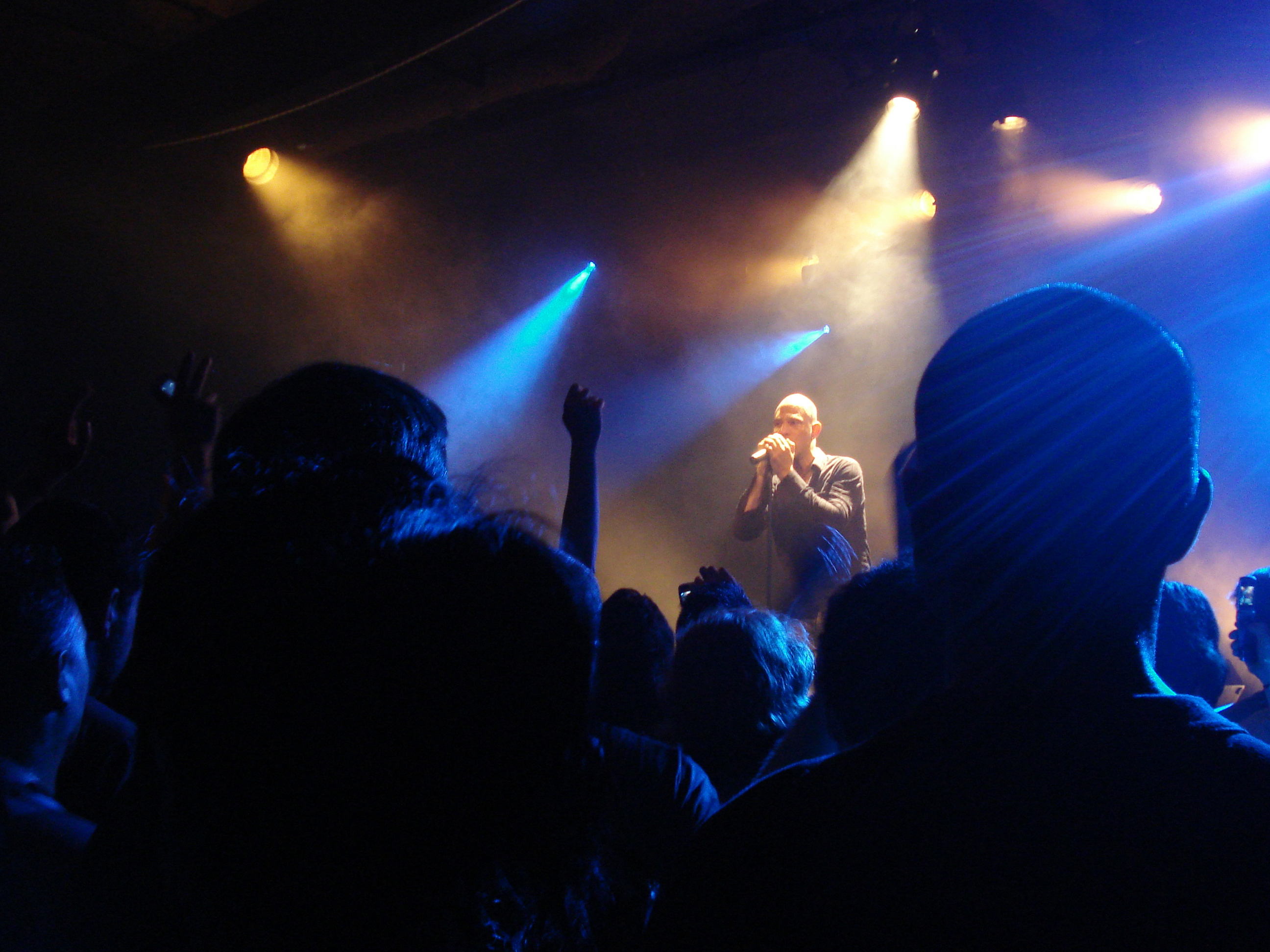 De/Vision en La Trastienda, Buenos Aires, Argentina.